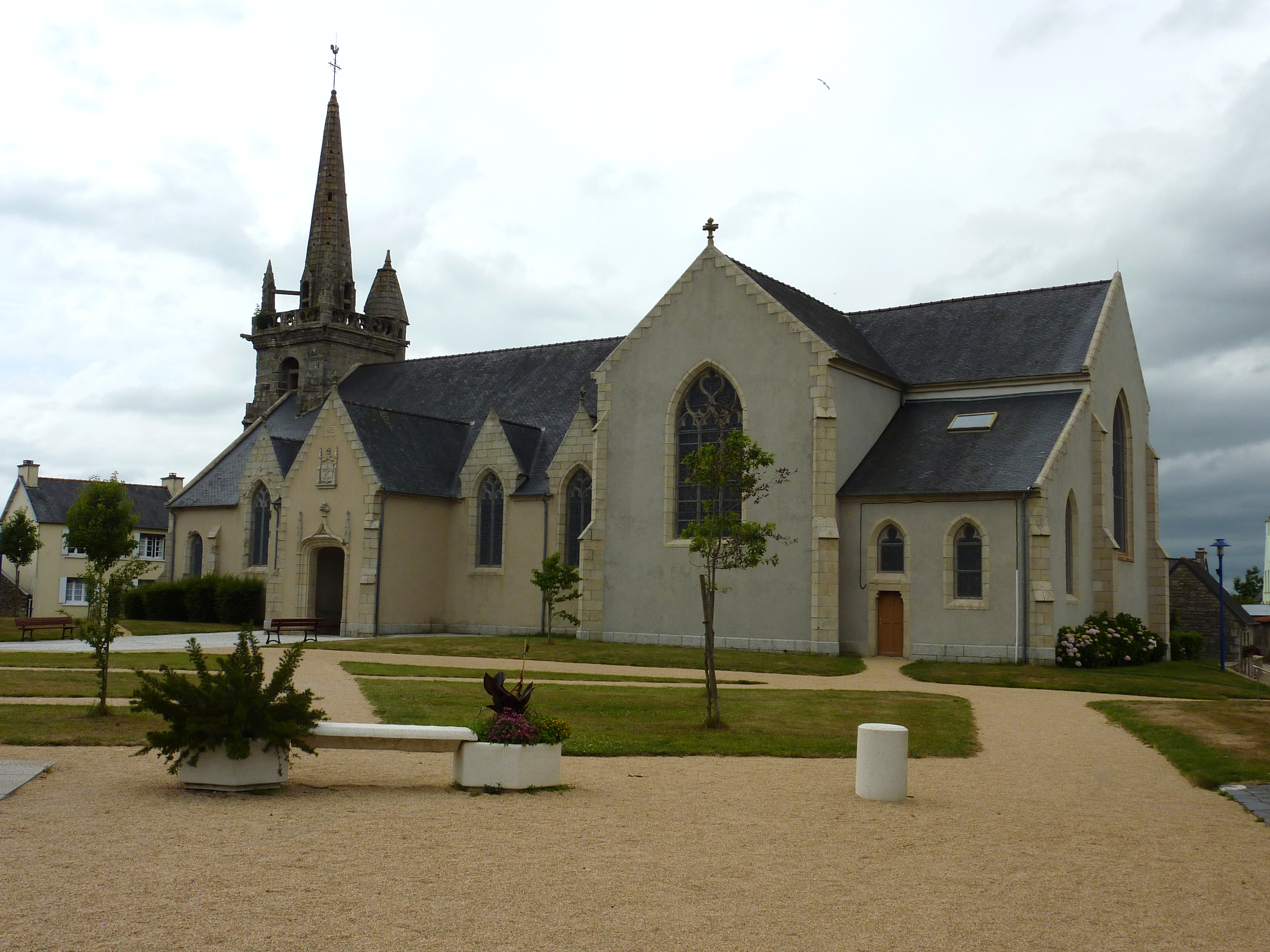 Scrignac: l'église paroissiale (1855)